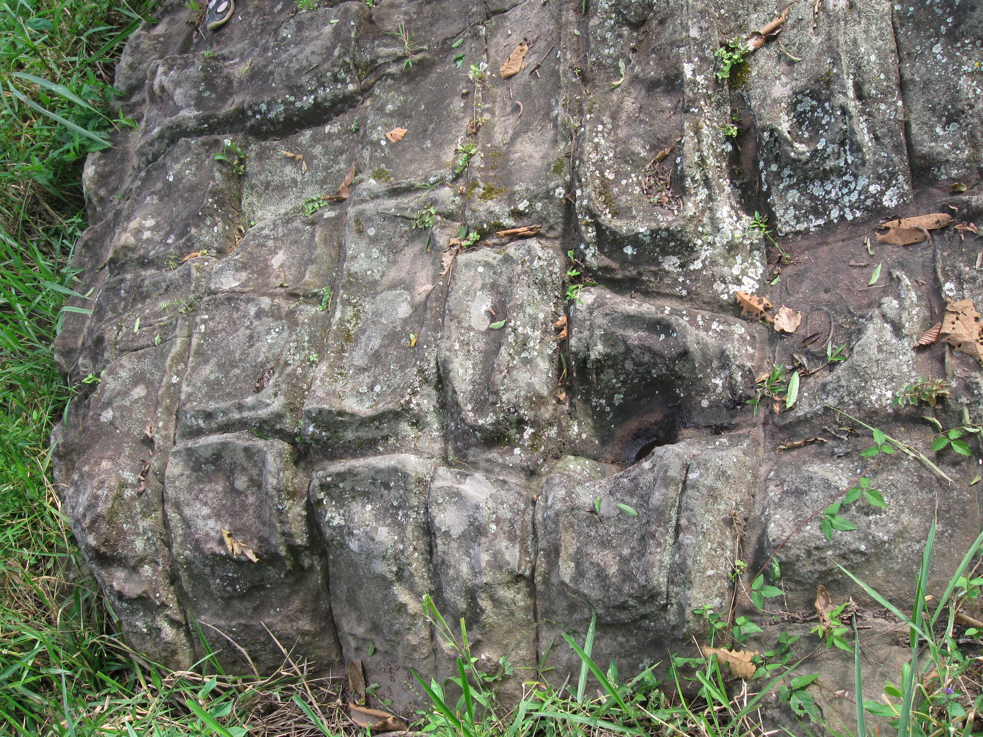 Jeroglíficos en Berbeo Boyacá